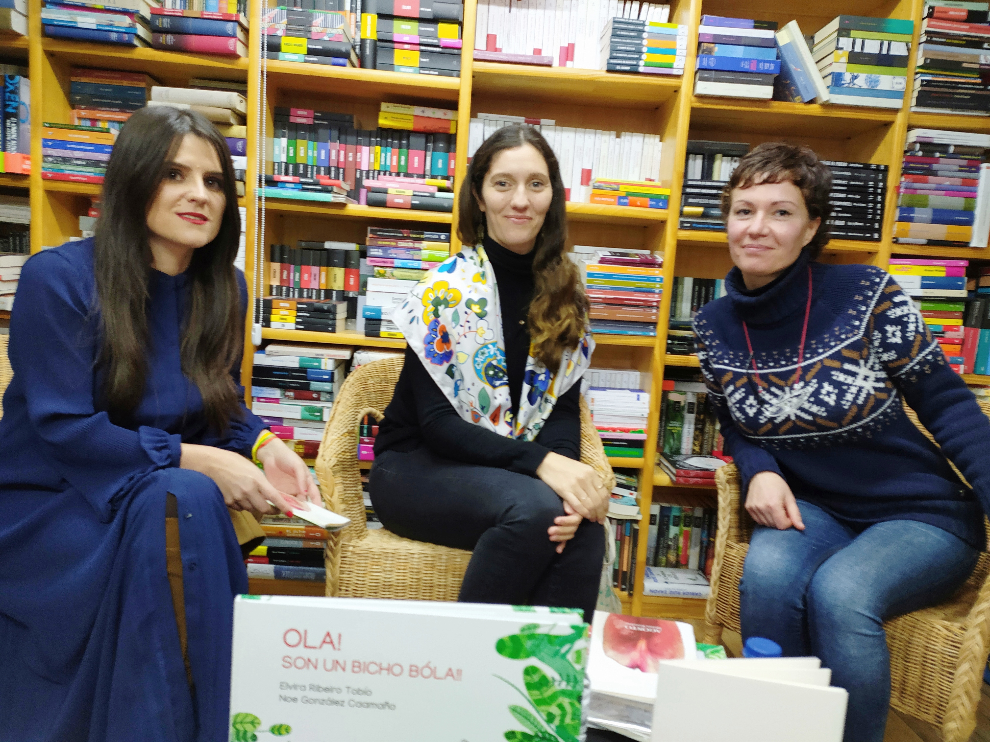 Miriam Ferradáns, Antía Otero e Elvira Ribeiro, escritoras galegas, na Libraría Paz de Pontevedra